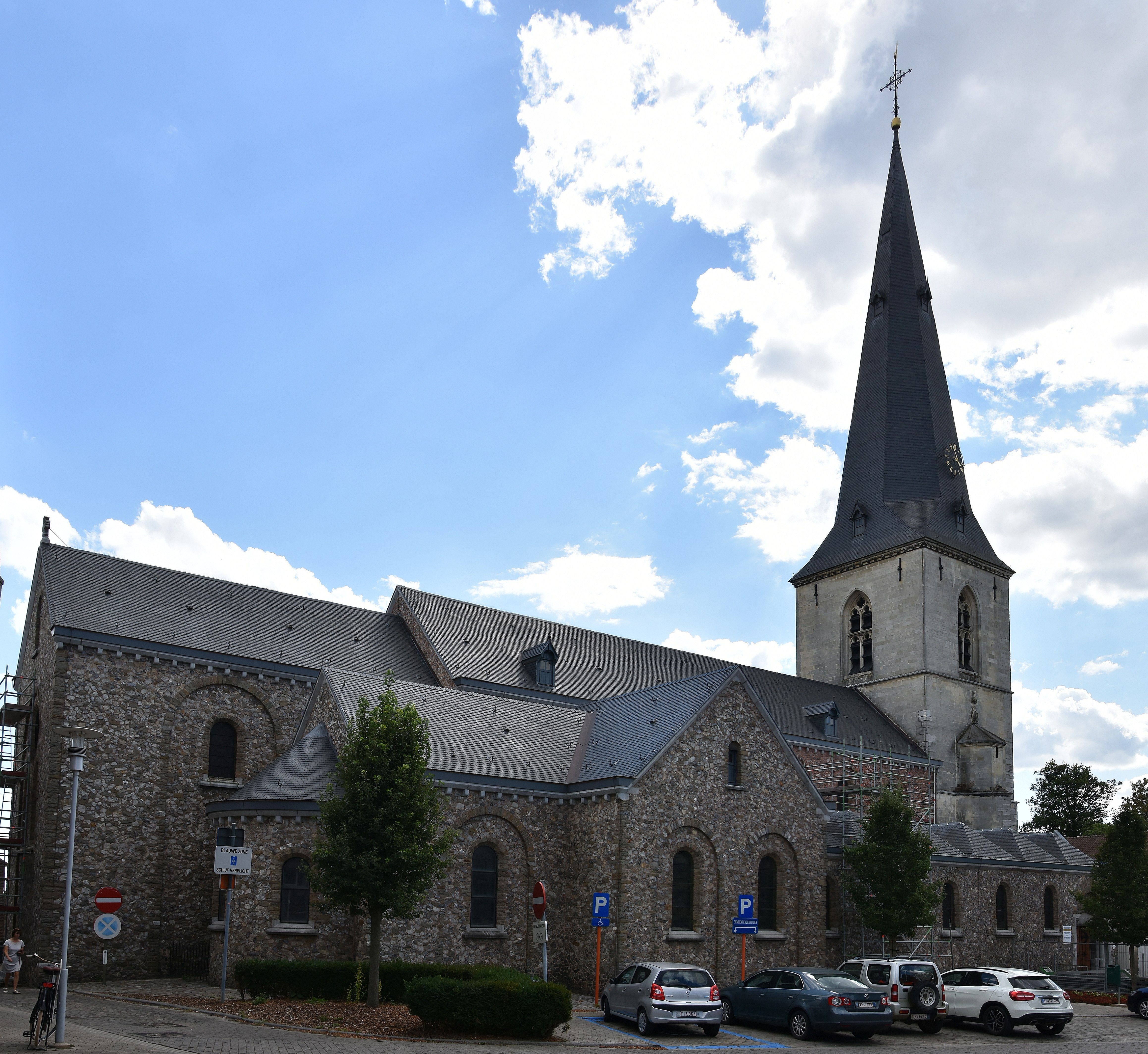 Sint-Odulphuskerk Borgloon 10-08-2018 This photo of immovable heritage has been taken in the Flemish Region